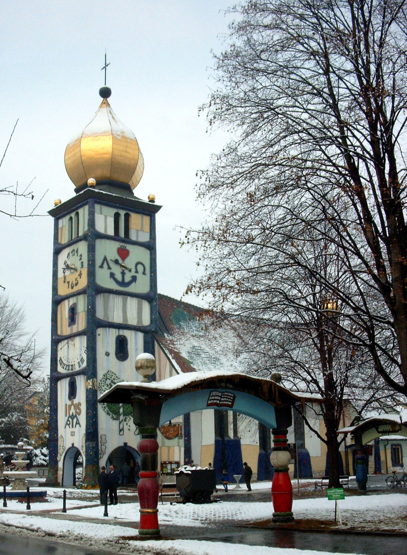 Barbarakirche von F. Hundertwasser